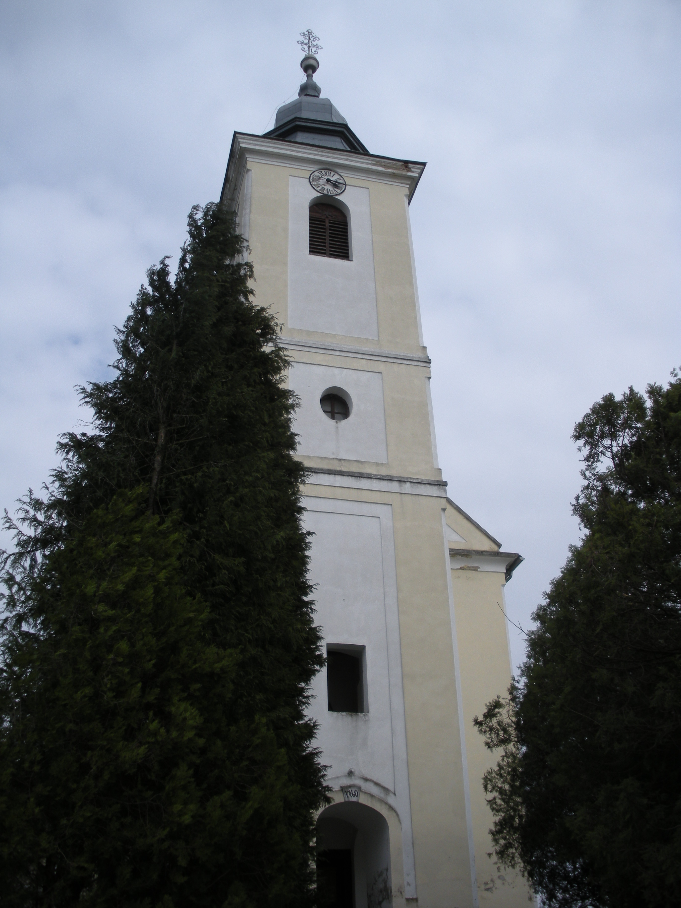 A Szent Mihály-templom tornya, Zalamerenye, Zala megye